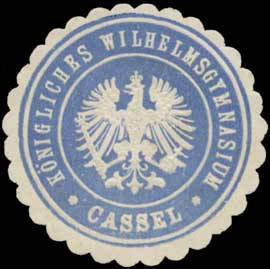 Sealing stamp Title: K. Wilhelmsgymnasium Cassel Description: blau, weiß, geprägt Place: Kassel size: 4 cm